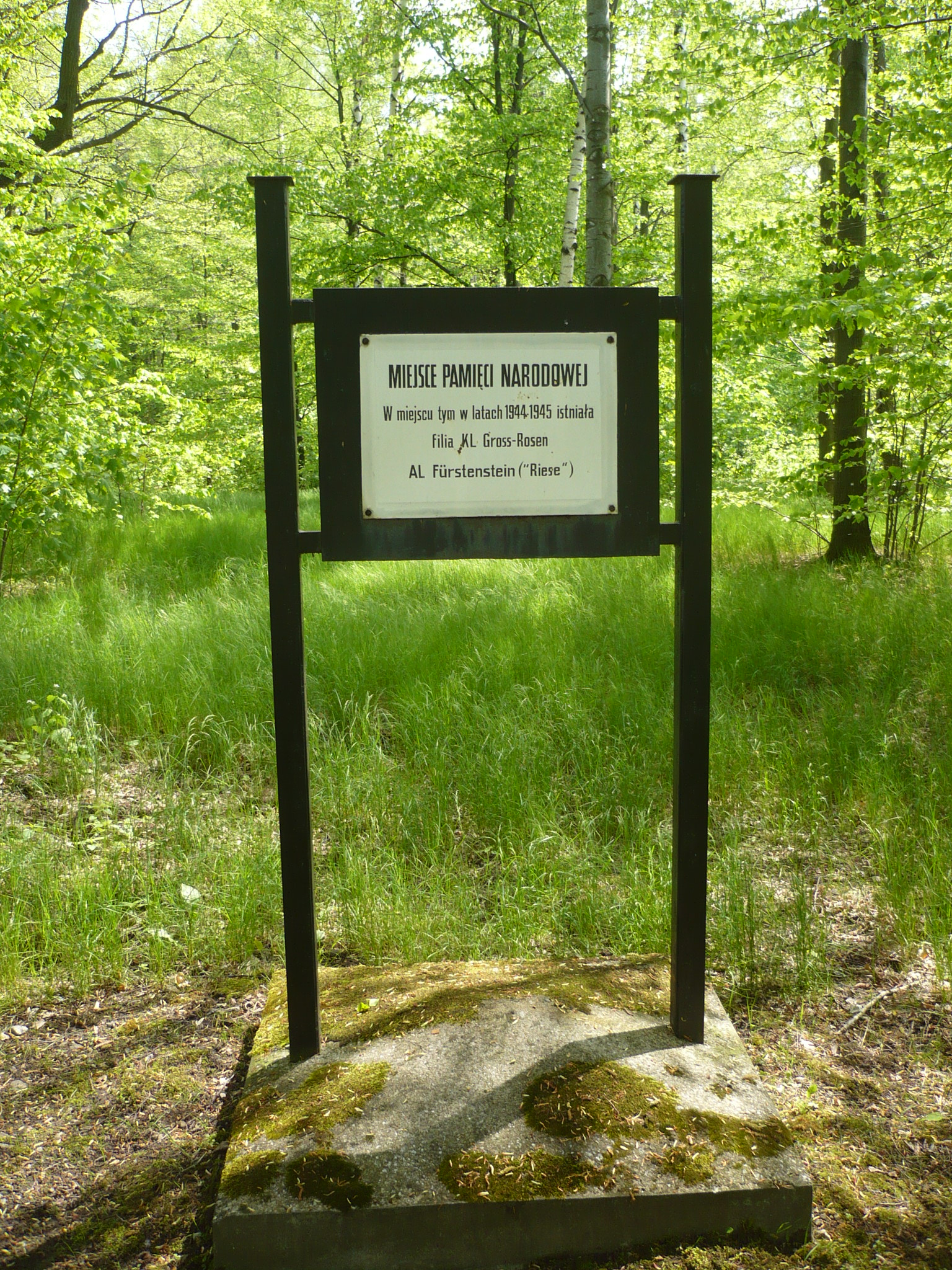 KLGross Rosen. Filia Książ